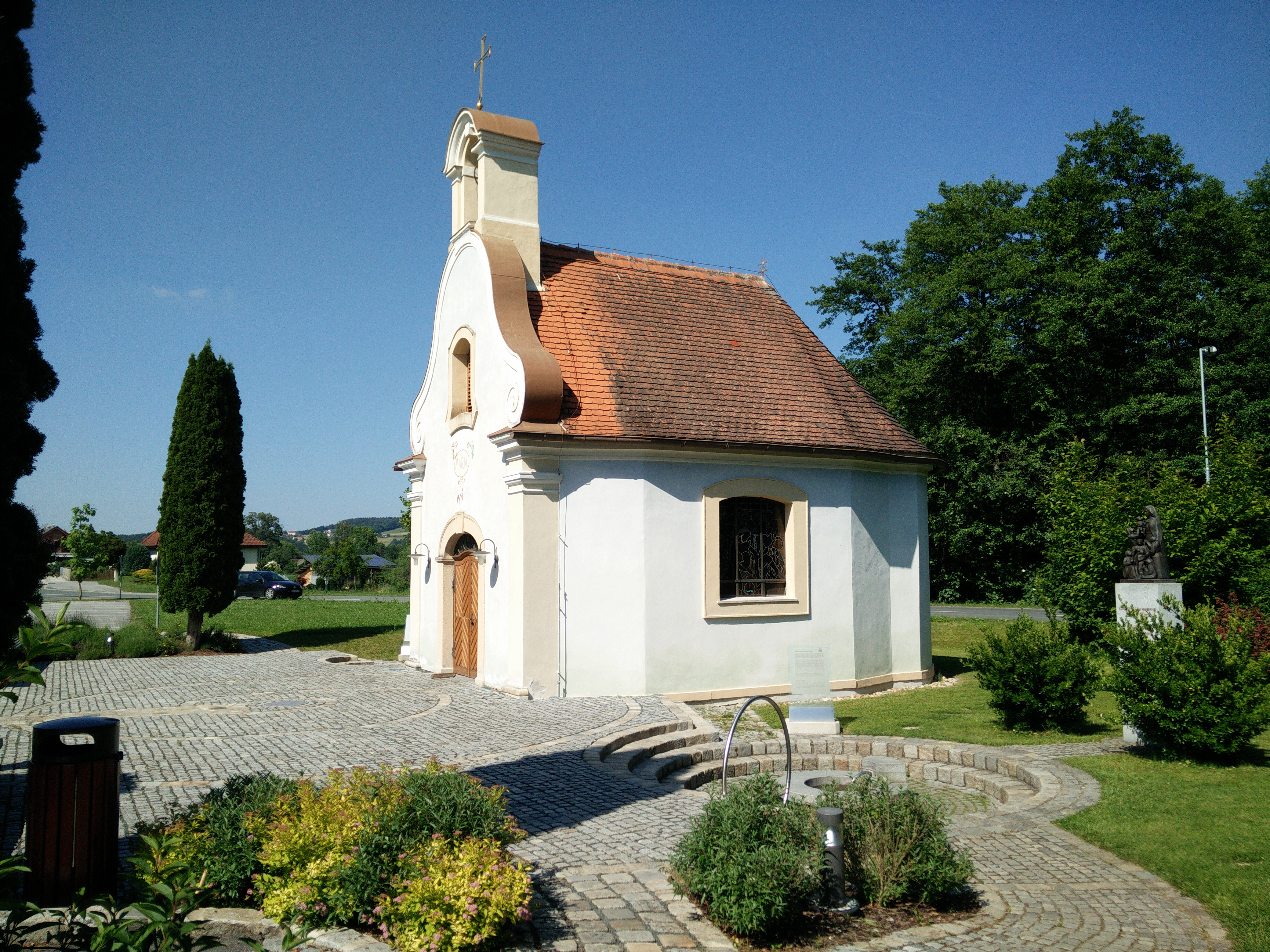 Marienquelle in Ollersdorf mit der im Jahr 1955 erbauten Gnadenkapelle